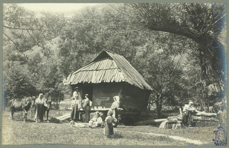 Adler - Moară din Petroşani, jud. Hunedoara